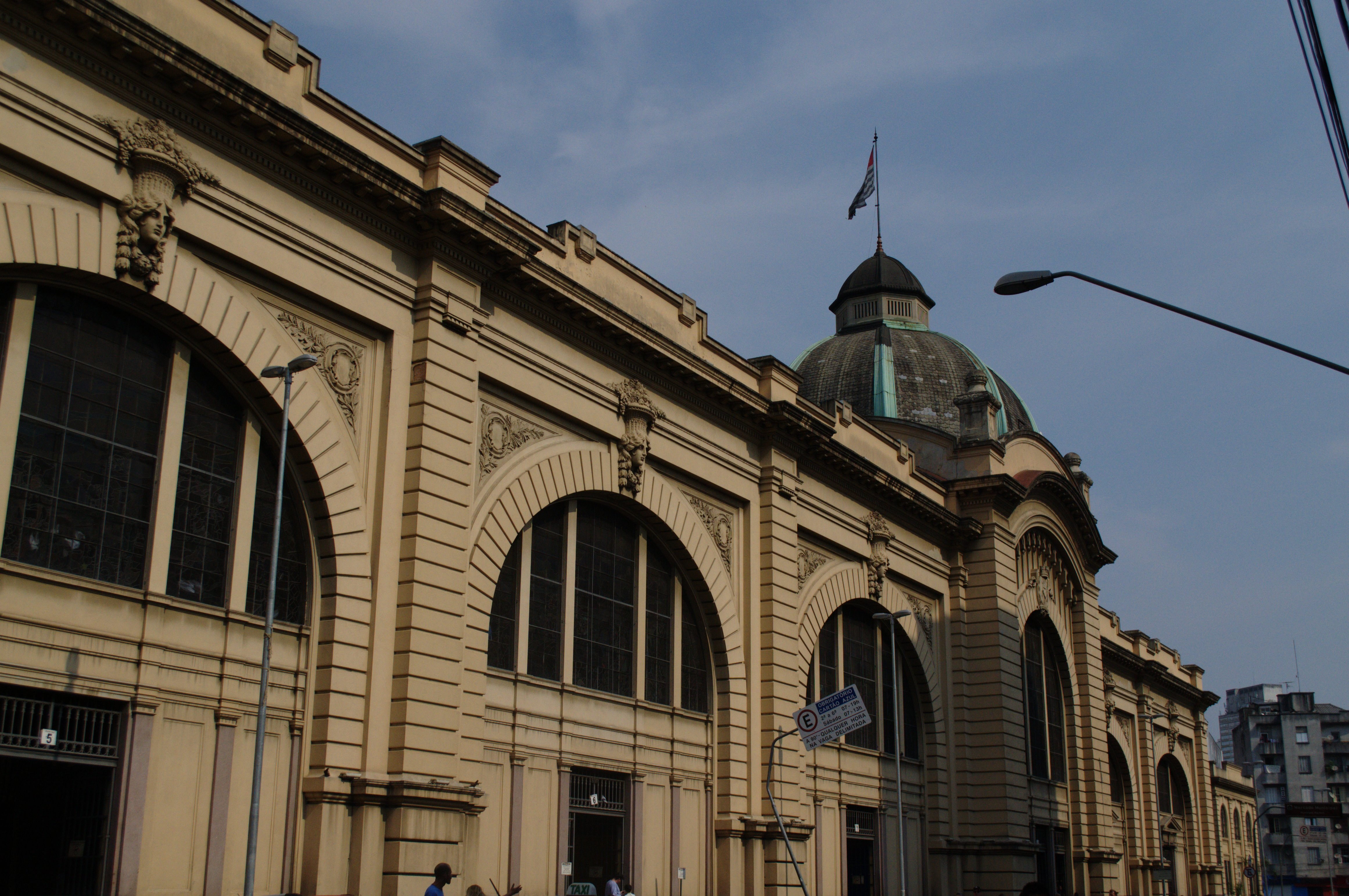 Fachada do Mercado Municipal de São Paulo.